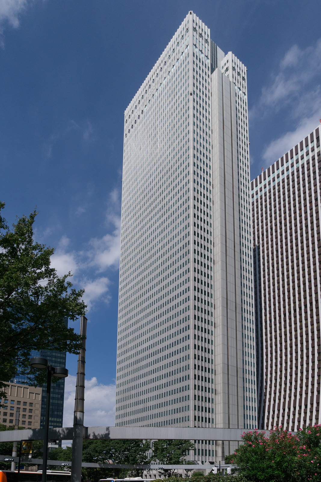 新宿野村ビル、東京都新宿西新宿。